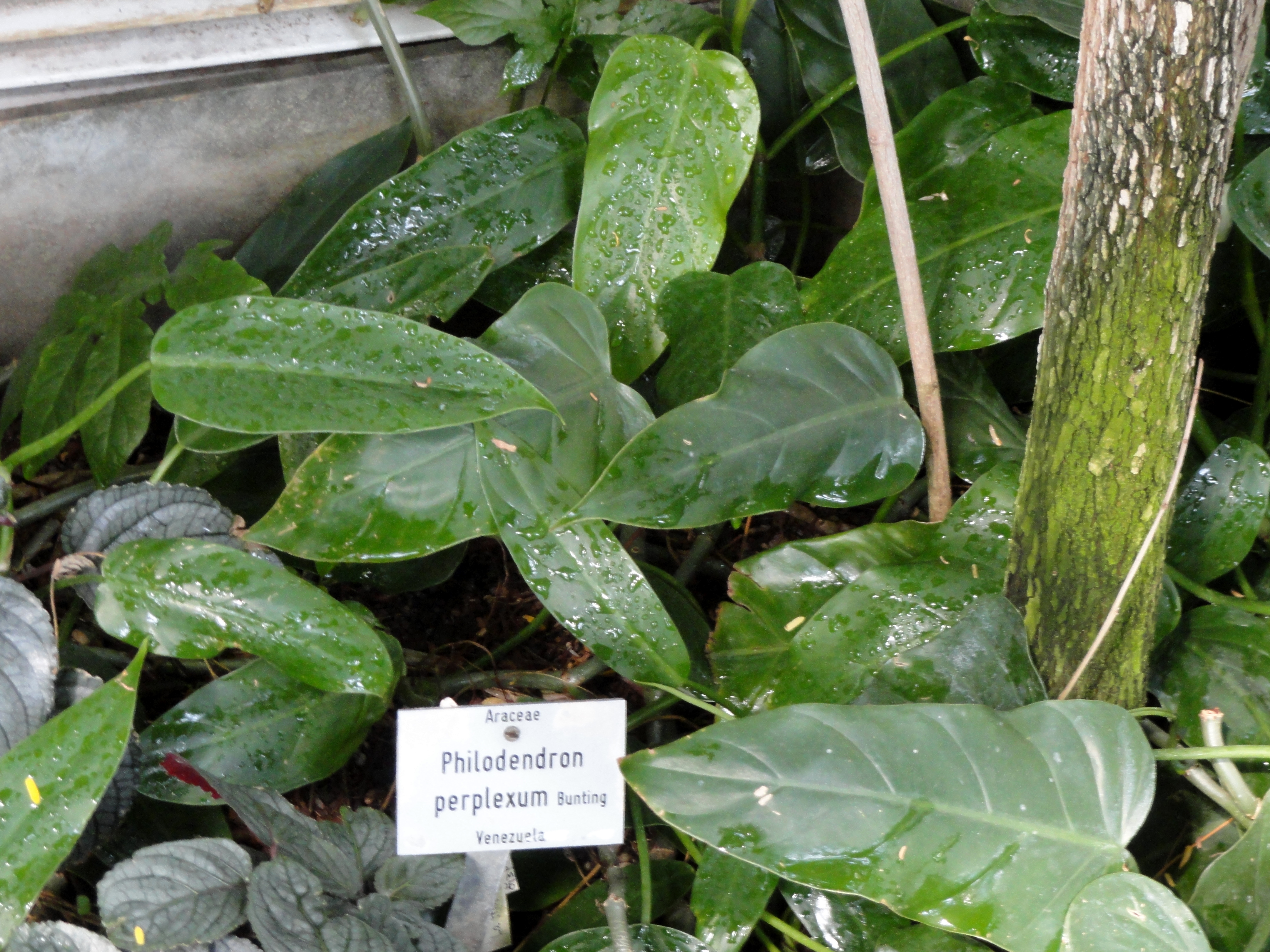 Philodendron perplexum specimen in the Botanischer Garten München-Nymphenburg, Munich, Germany.